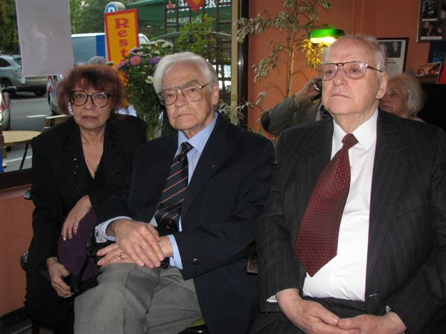 Irena Eichler-Wieczorkowska, Polish journalist and Aleksander J. Wieczorkowski (1929-2012) – Polish journalist and publicist and Janusz Krasiński (1928-2012) - Polish writer